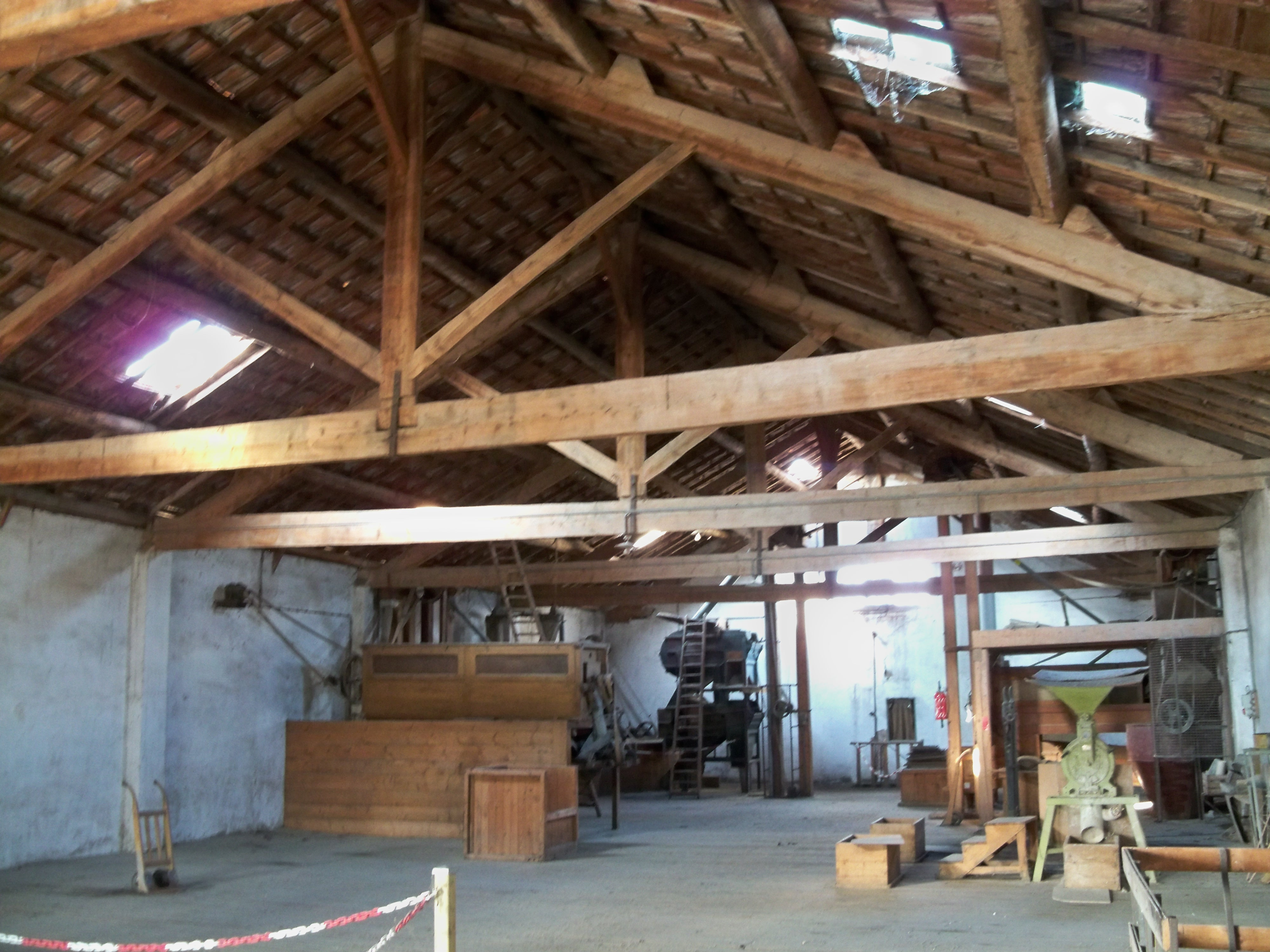 Intérieur de la Graineterie Aimé Roux, Carpentras (84) .